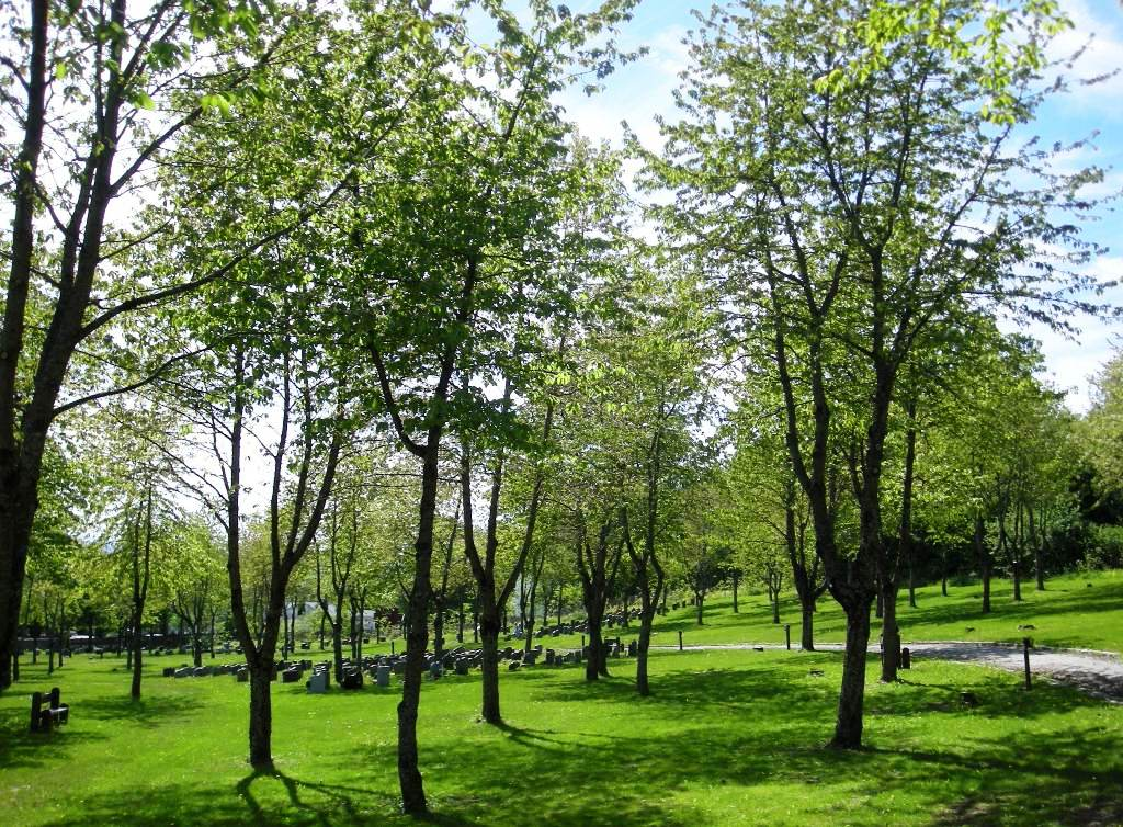 Hol gravlund (Hamar)